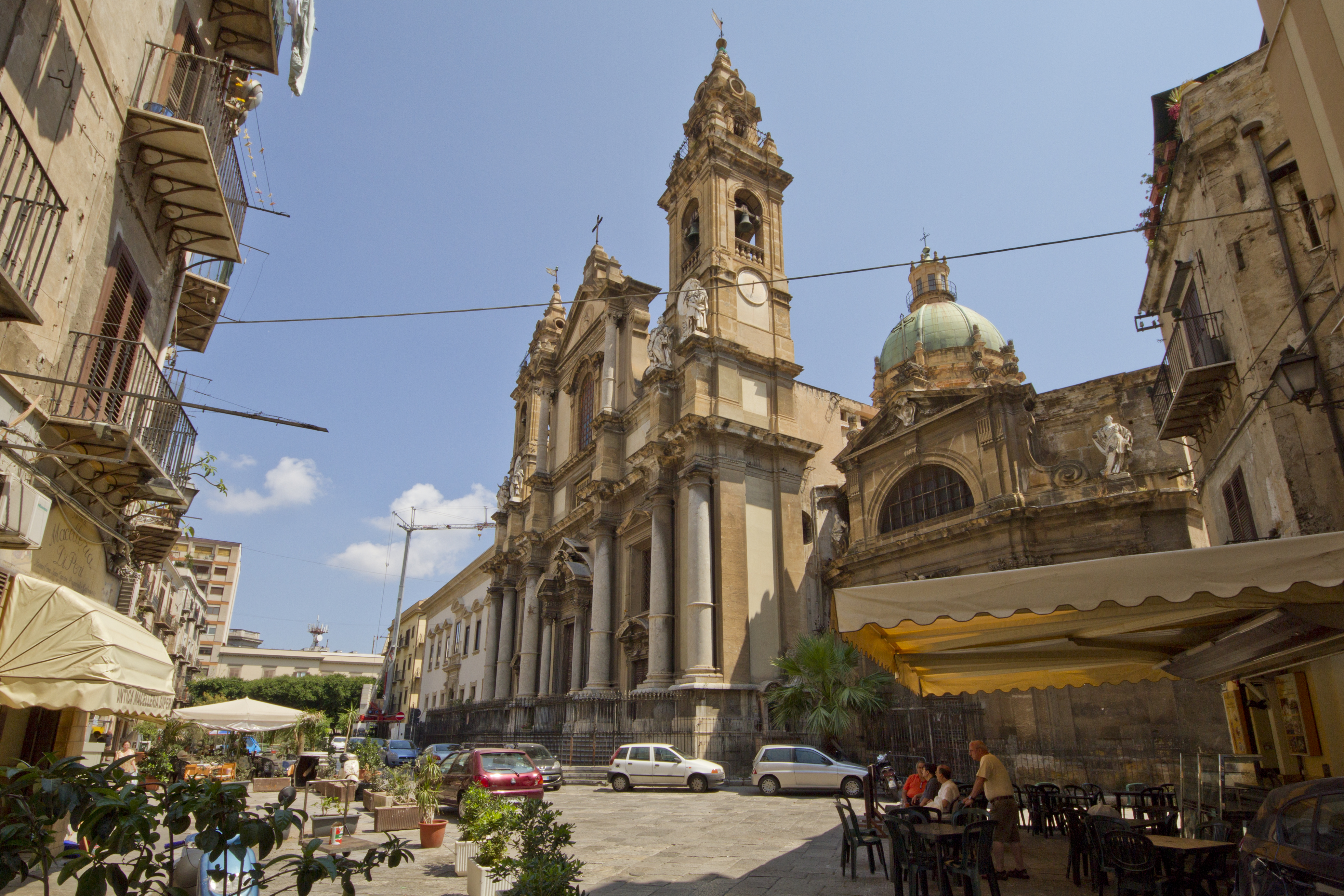 S. Ignazio all'Olivella